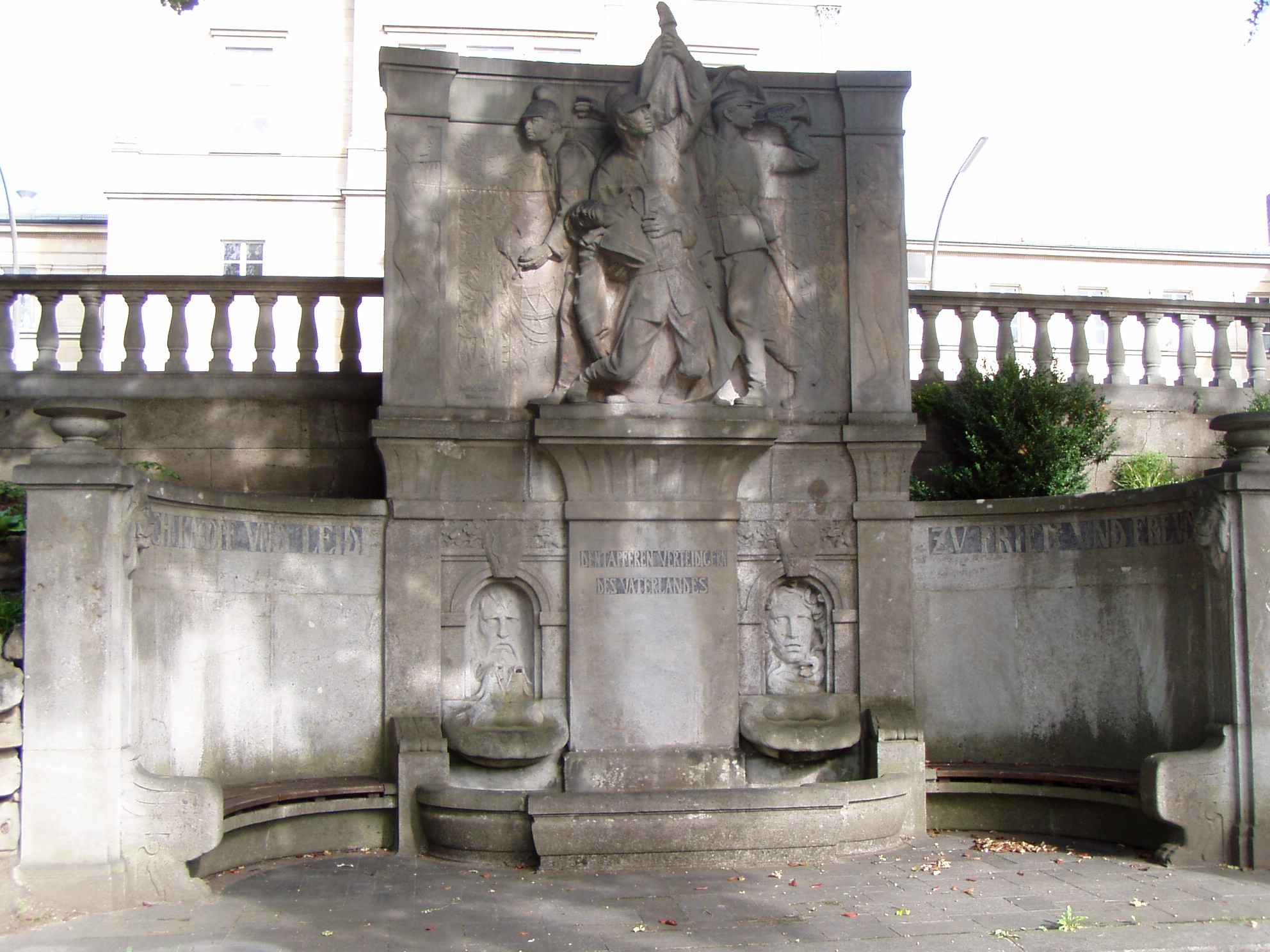 Kriegerdenkmal in Bad Kissingen, beim Bahnhof; 1900-1904 von Bildhauer Balthasar Schmitt (München); unter Denkmalschutz